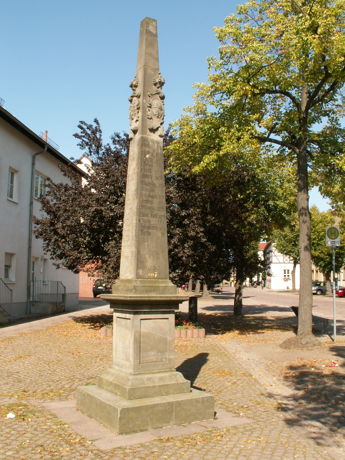 Distanzsäule Brehna